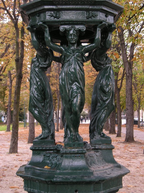 Fontaine Wallace, Champs Elysees, Paris